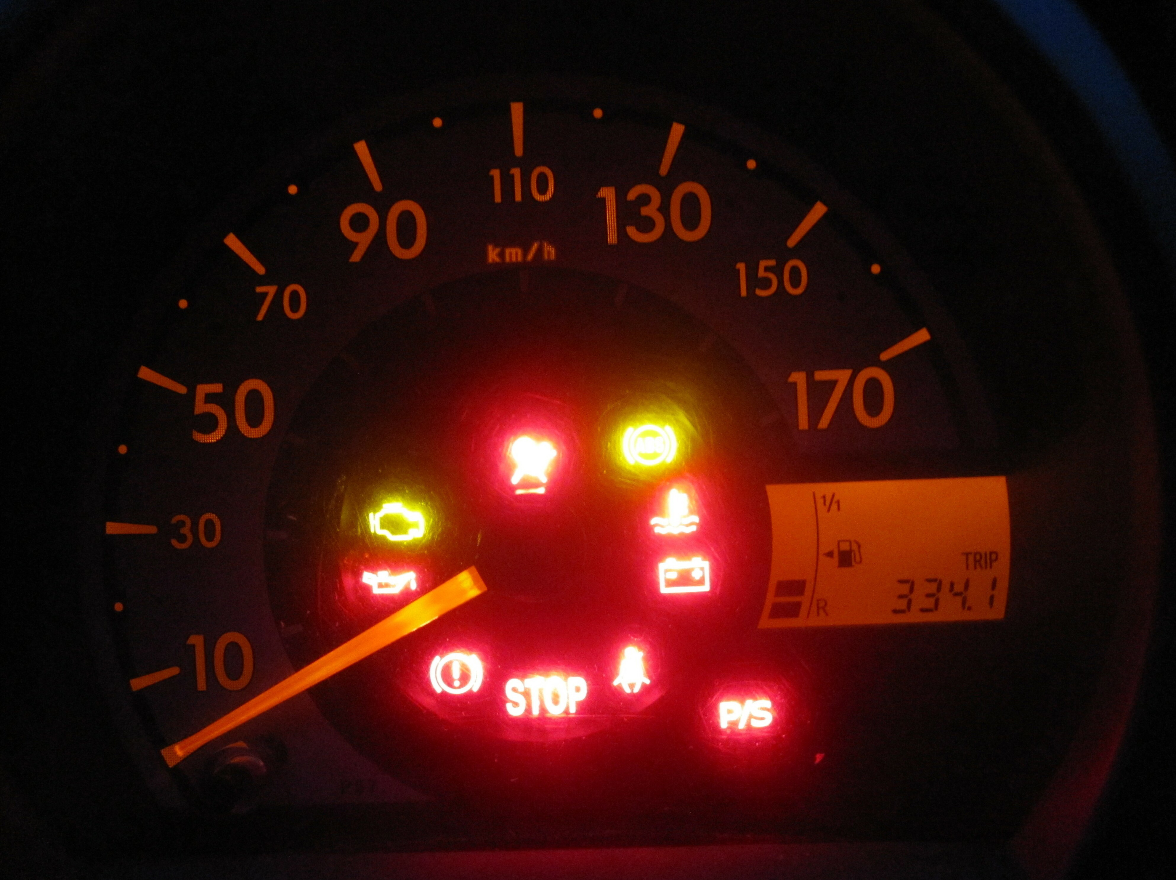 Citroën C1 Gauge Illumination